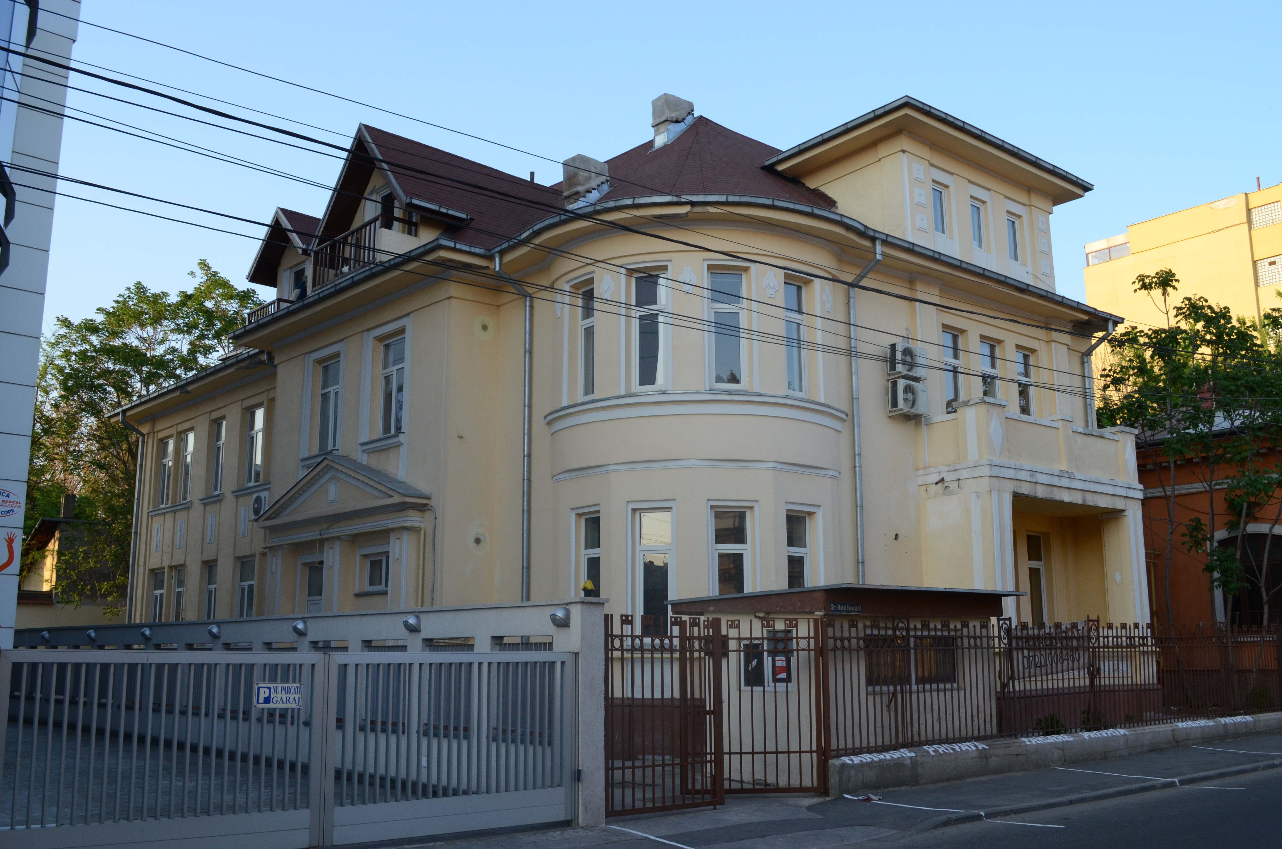 Casă, Strada Matei Basarab nr. 49, Sector 3, București